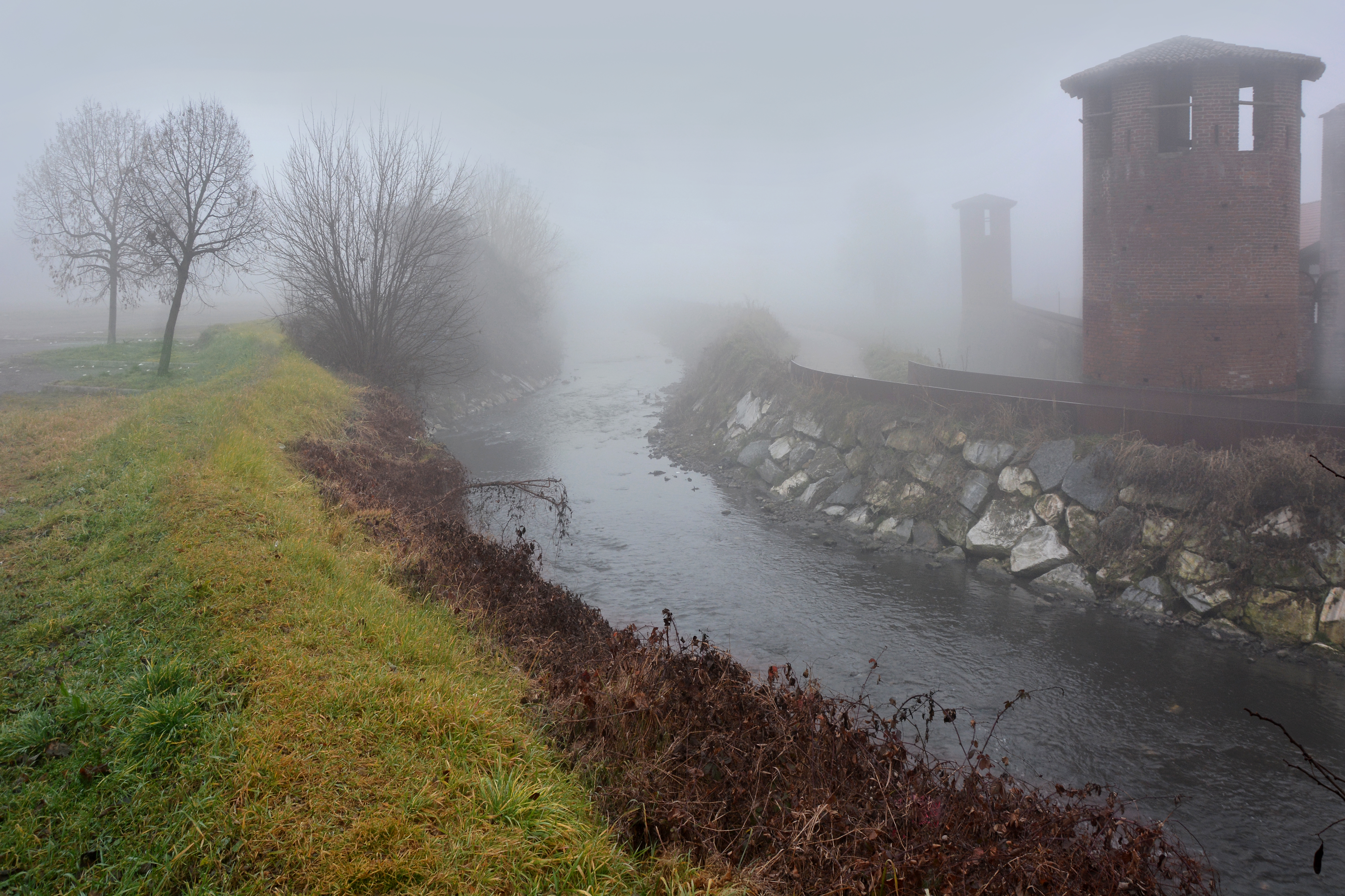 Q3662653 This is a photo of a monument which is part of cultural heritage of Italy.